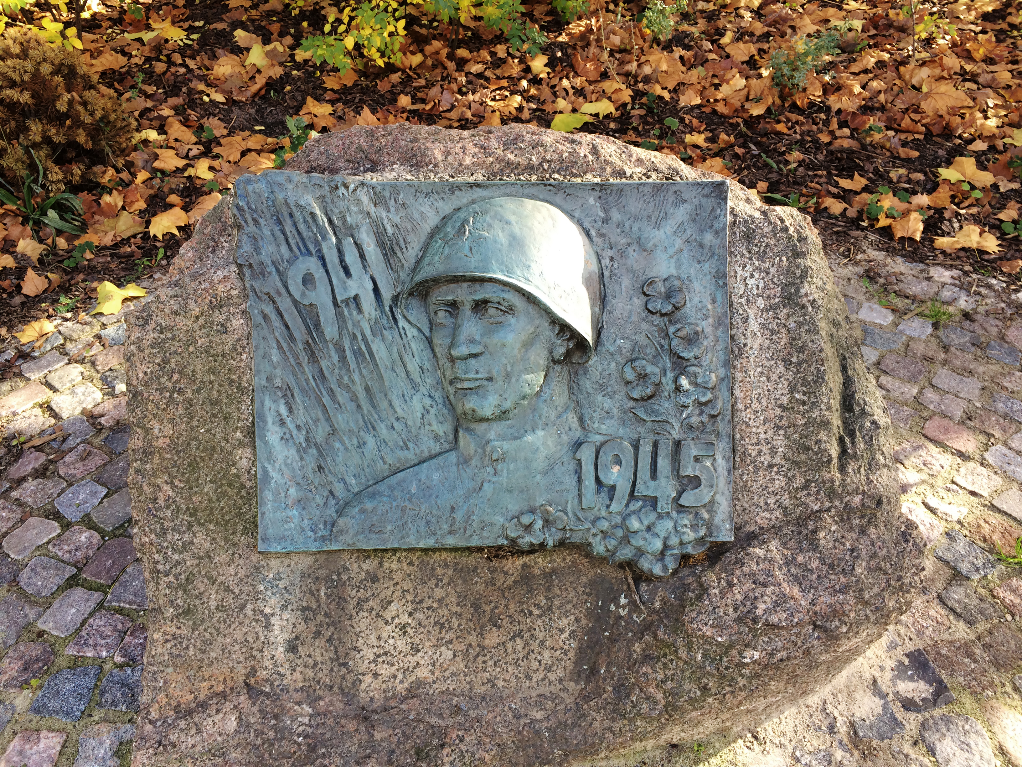 Günter Schütz - 1941 - 1945, Ostseestr., 10409 Berlin-Prenzlauer Berg, gegenüber Ostseeplatz, Relief Bronze,1985, Land Berlin